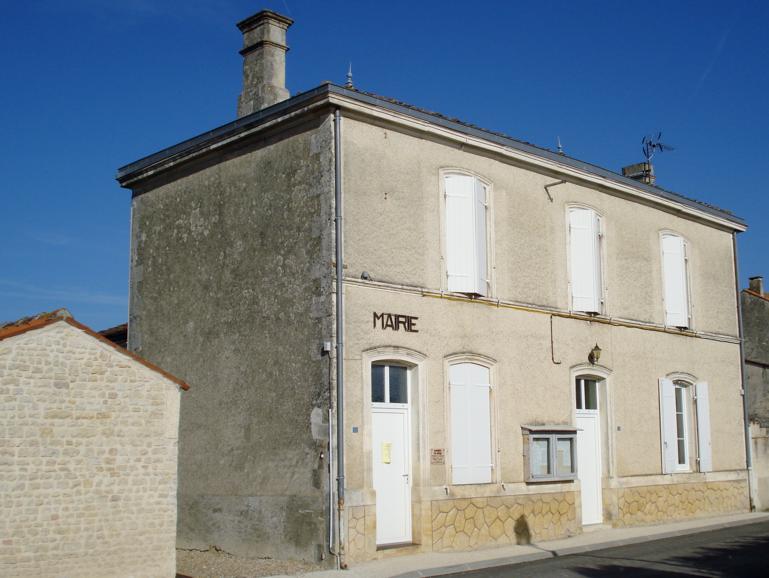 Mairie du Gicq en Charente-Maritime